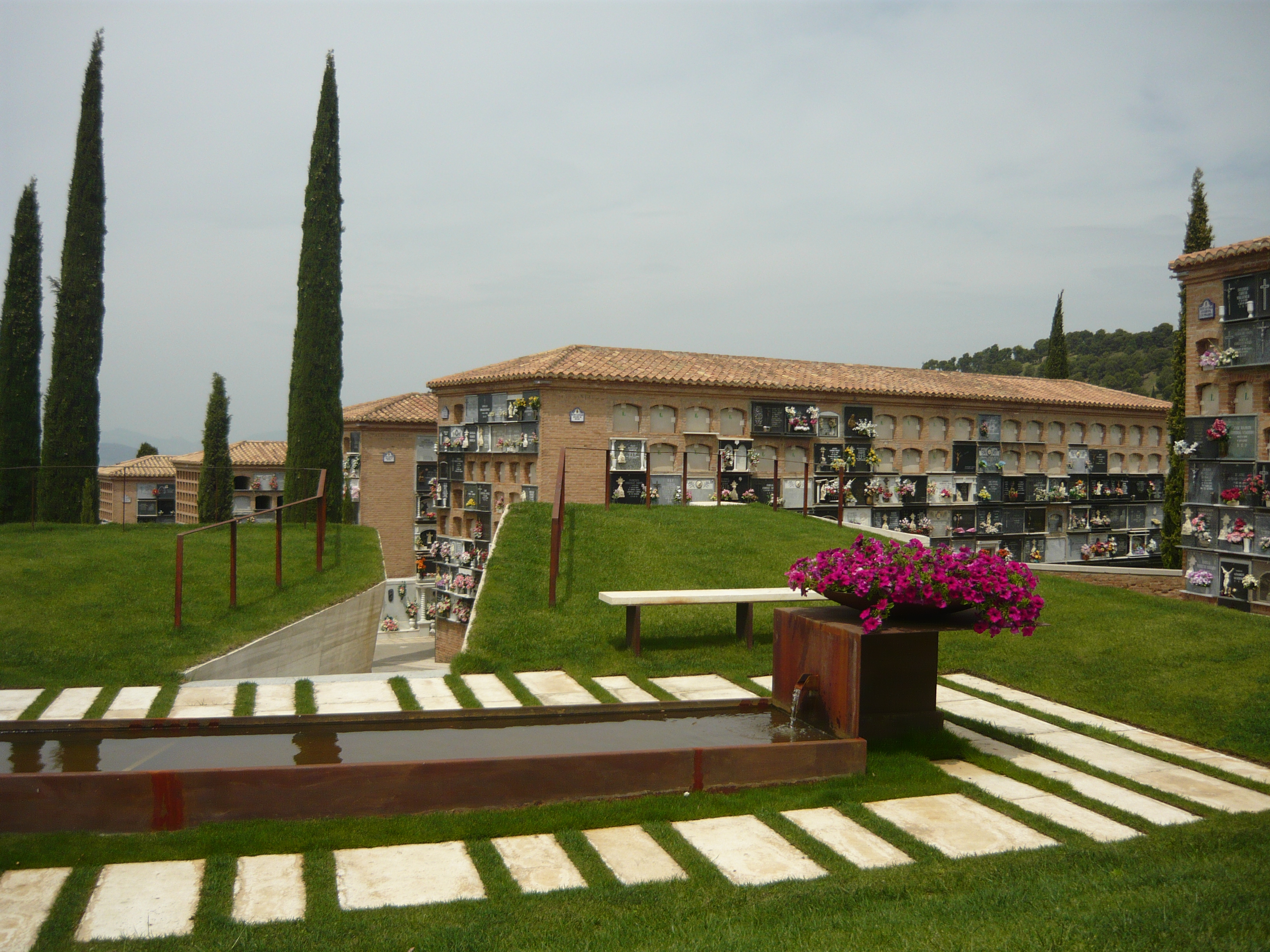 Espacio Memoria de Granada, en el patio de San Juan del Cementerio granadino de San José. Obra de los arquitectos Eduardo Jiménez y Yolanda Brasa. Inaugurado en 2007.